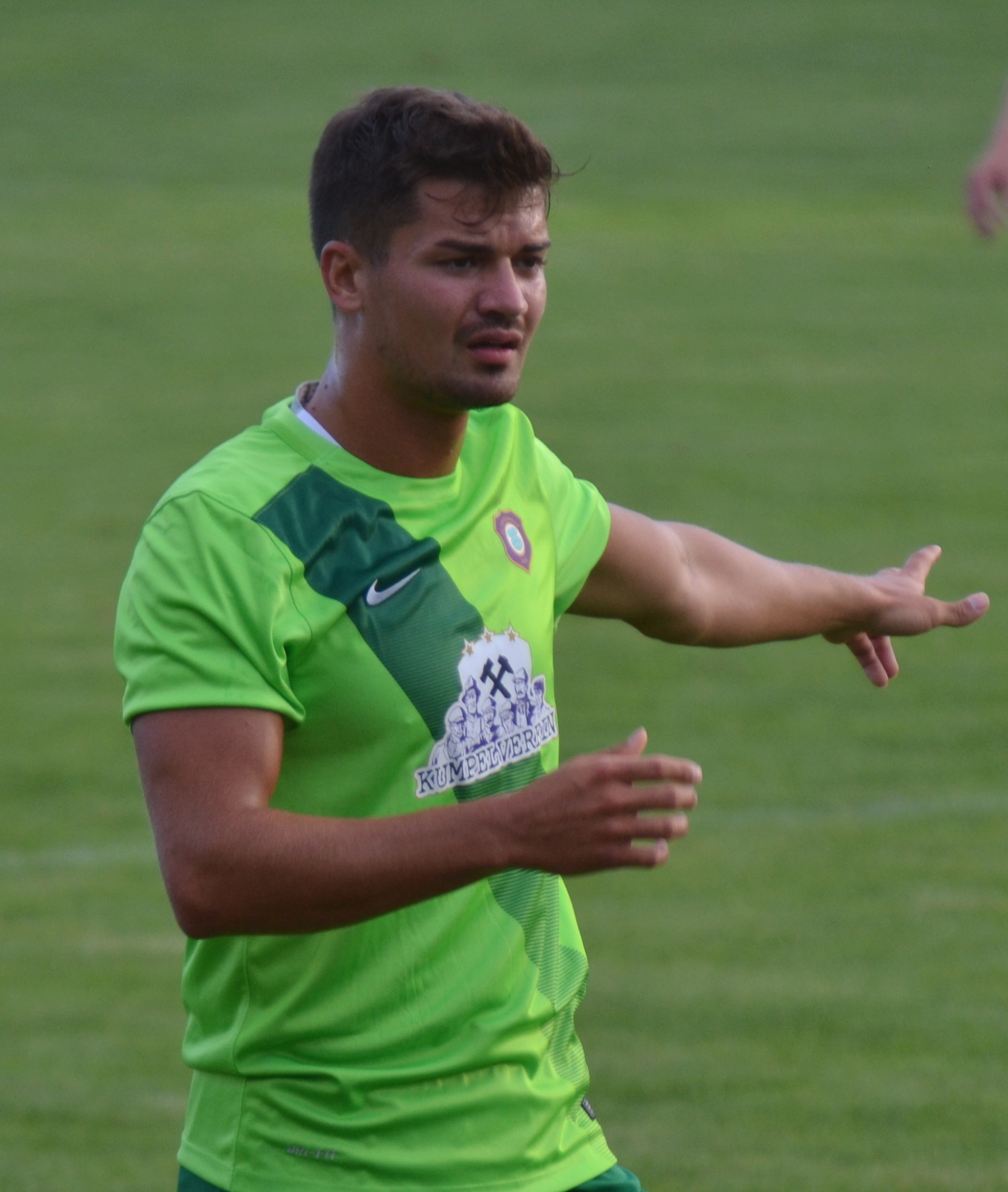 Julian Riedel im Freundschaftsspiel von Erzgebirge Aue gegen den HFC Colditz im Juni 2016